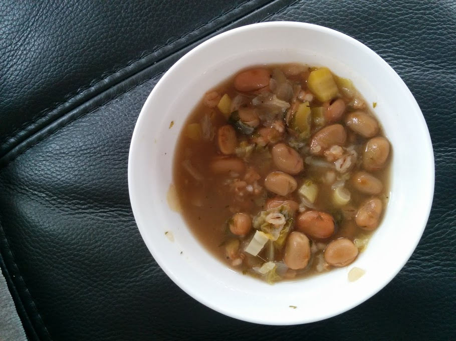 Soupe aux gourganes (cuisine québécoise)